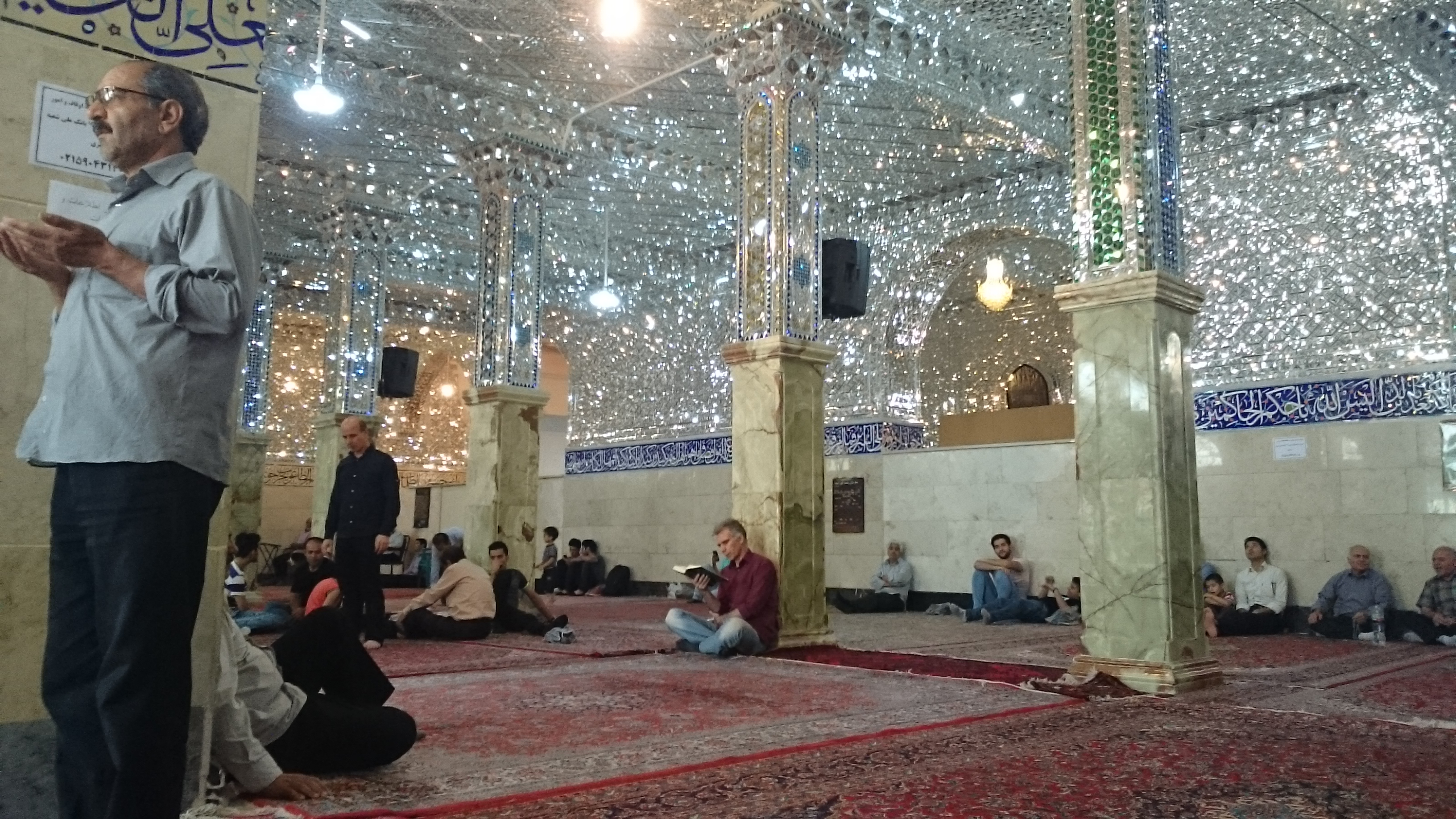 امامزاده داوود سولقان